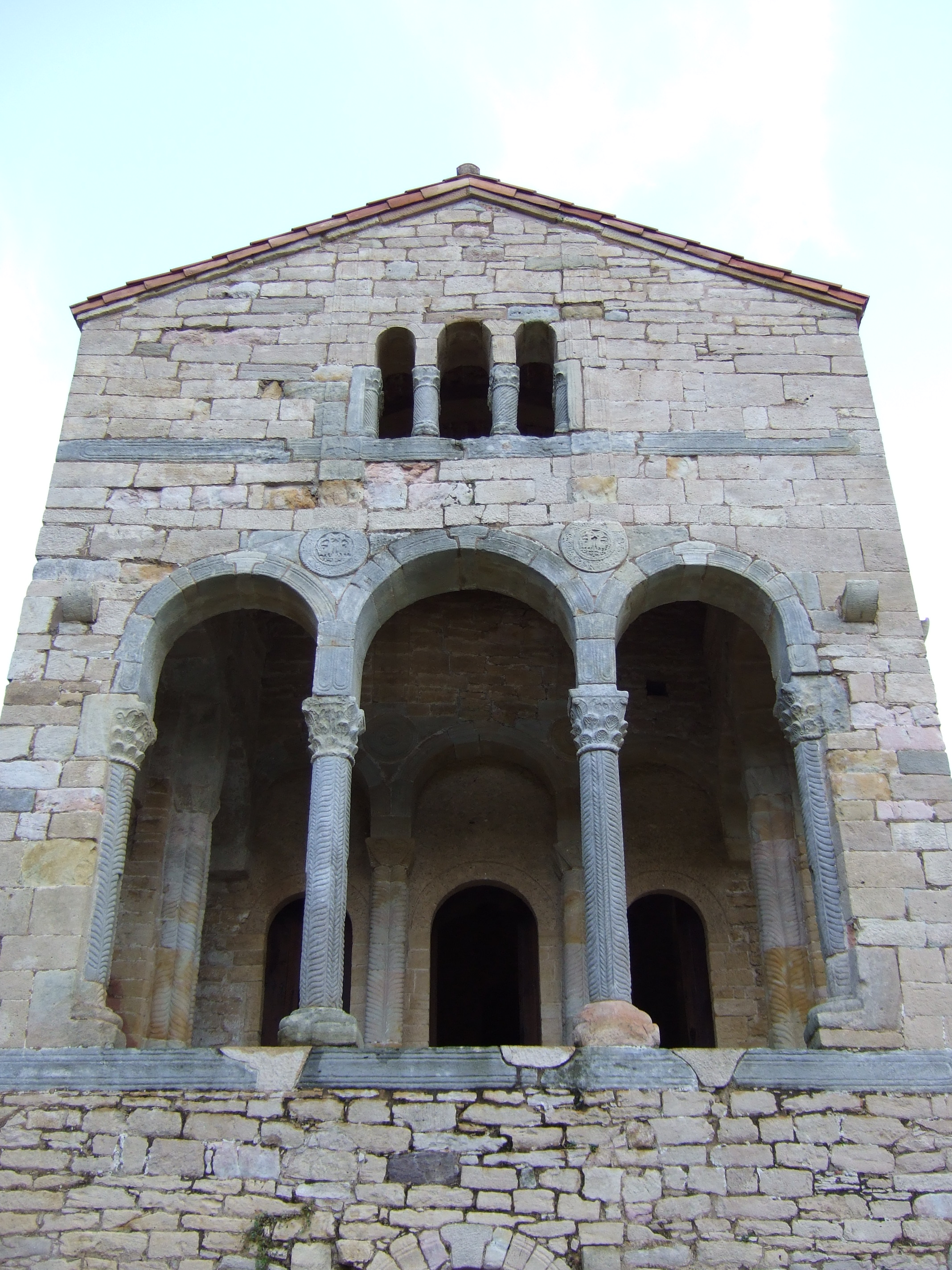 Oviedo - Santa María del Naranco - Mirador